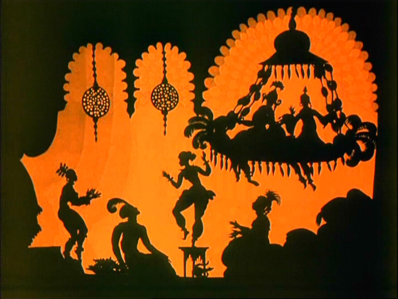 fra silhuettfilmen Die Abenteuer des Prinzen Achmed (1923–1926) Filmskaper: Lotte Reiniger